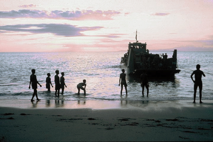 Descarregando material de uma barcaça ,ao fim do dia, em Erquina, LDM-lancha de desembarque média"-"barcaça de desembarque "Loes".